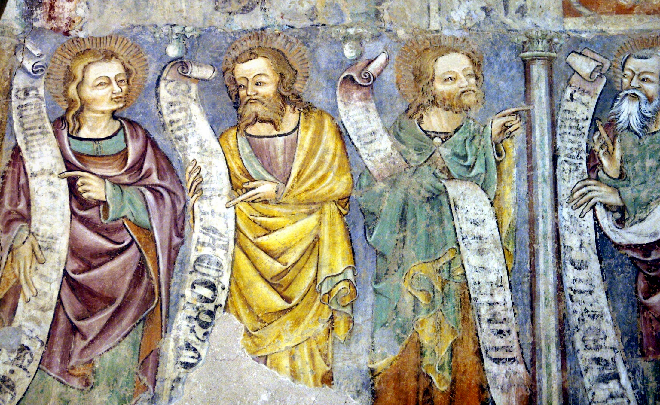 Toronyhely, apostolok - freskórészlet This media shows a cultural heritage object of Slovenia with the EŠD number: 791